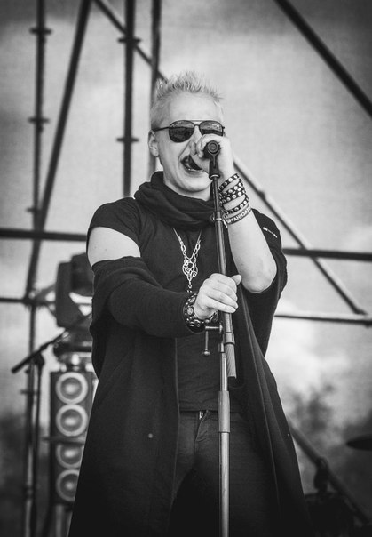 Тим Эрна на на фестивале "Мото-Малоярославец 2016"